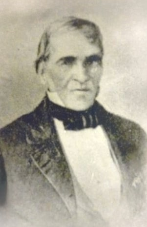 Antonio Pinto Soares (1780-1865), marino portugués quien llegó a ser Jefe de Estado de Costa Rica en 1842 tras derrocar a Francisco Morazán.